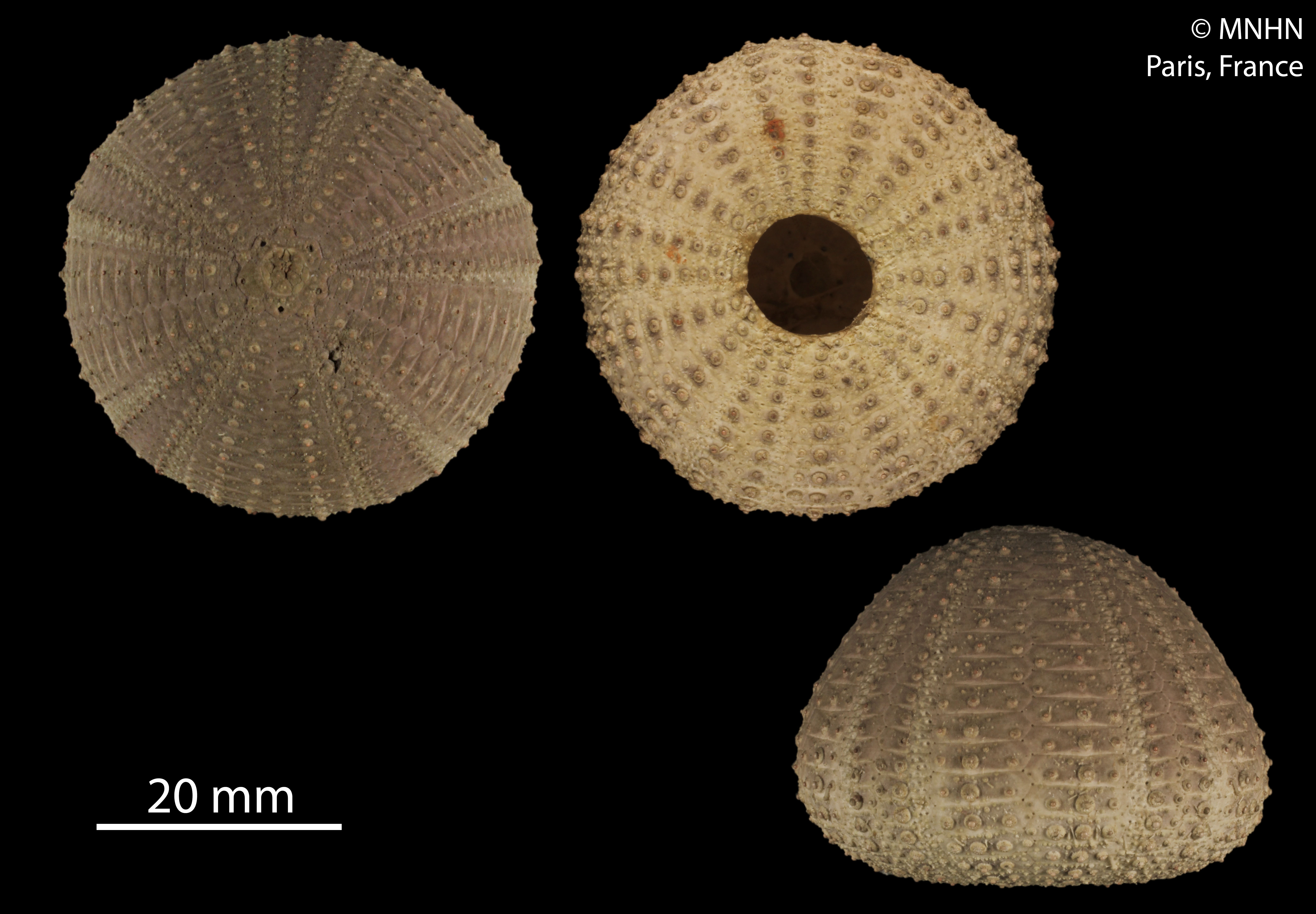 Salmacis sphaeroides, collection du Muséum National d'Histoire Naturelle (Paris, France).